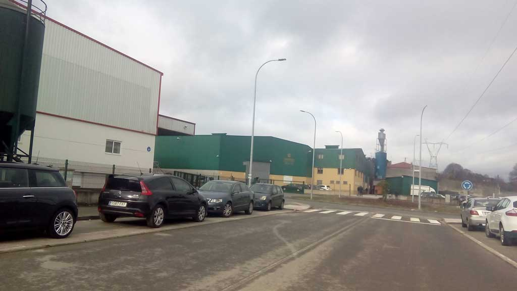 Polígono de Capelo, vista de Cerqueiro.